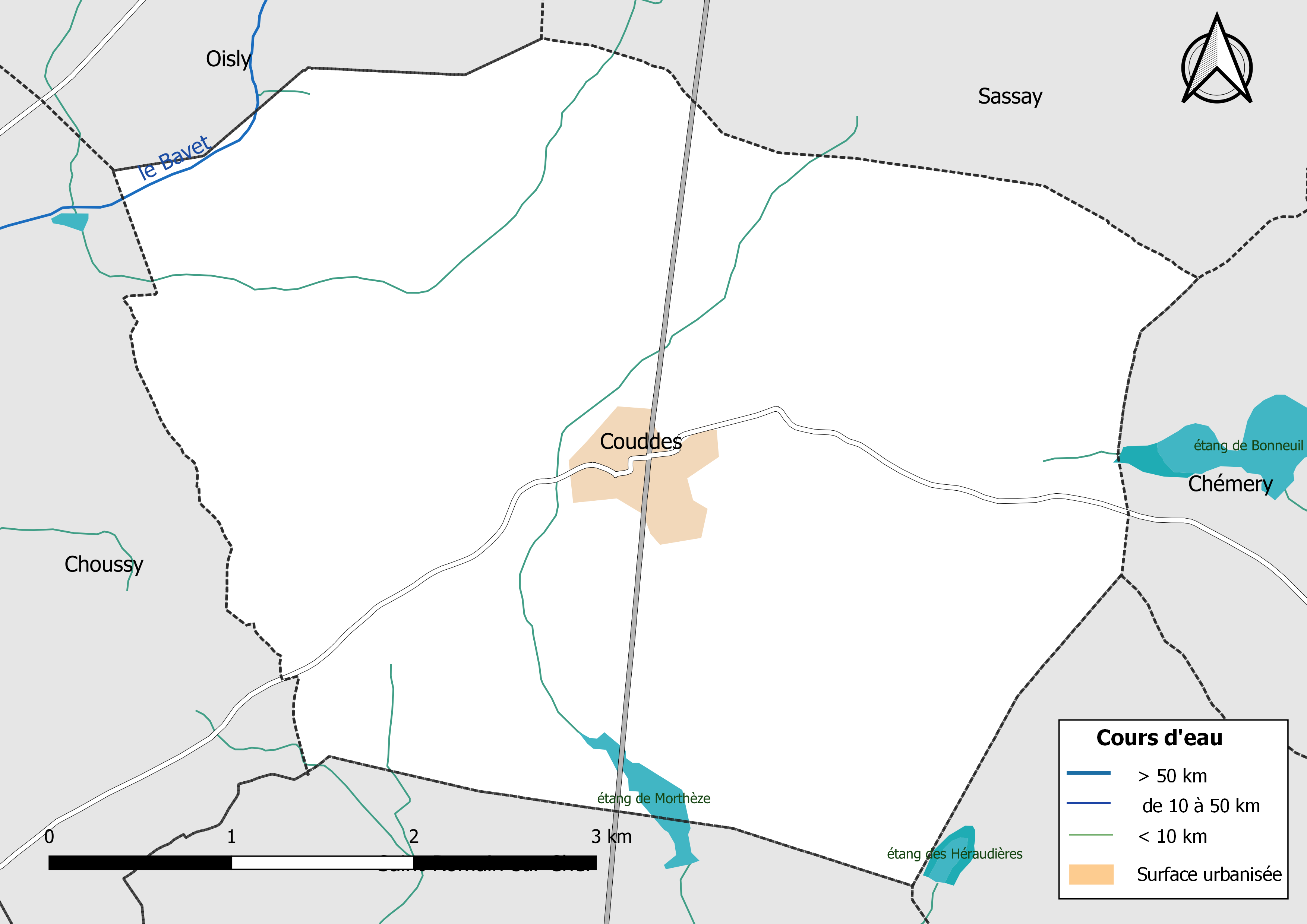 Carte du réseau hydrographique de la commune de Couddes (Loir-et-Cher, France).